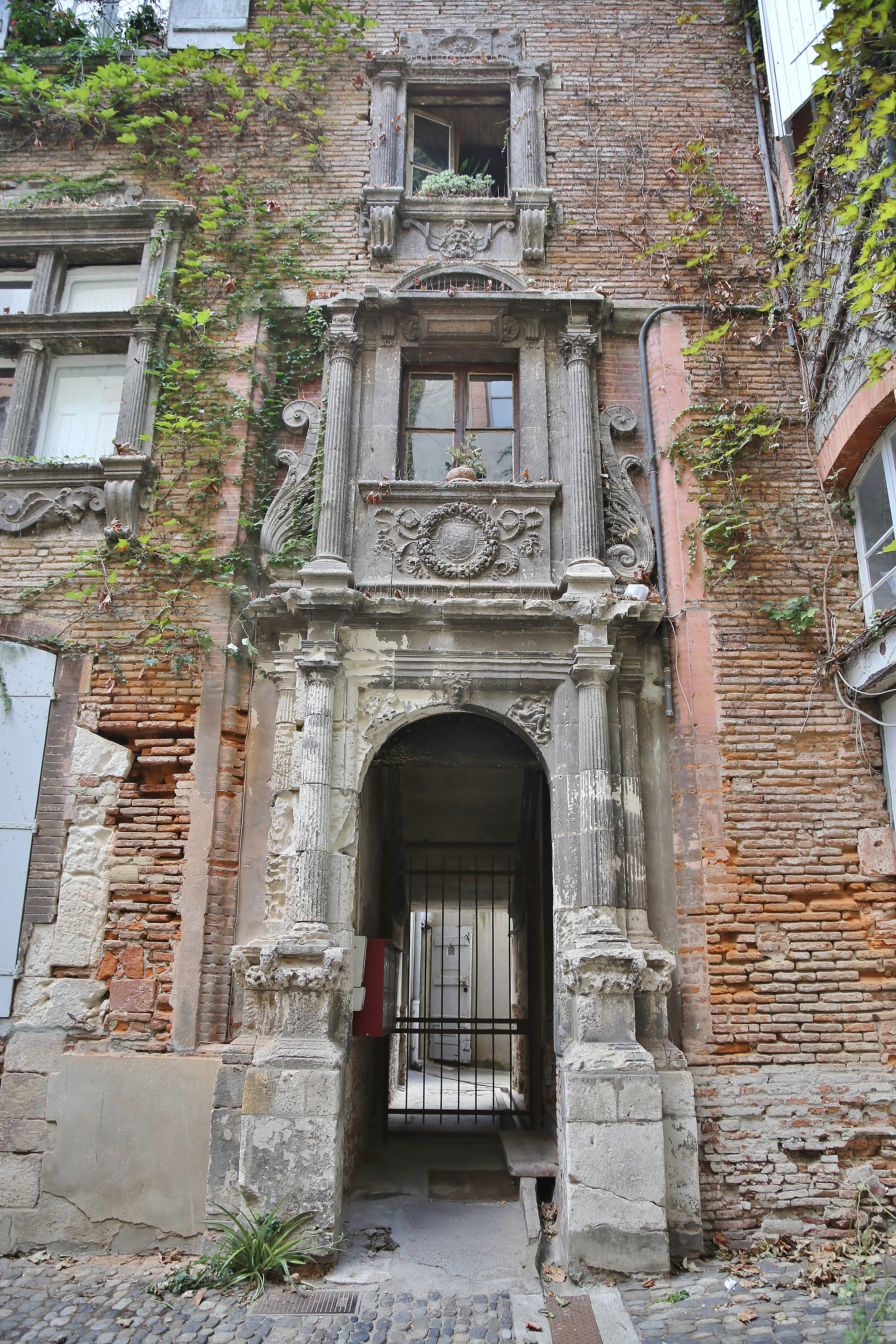 Hôtel de Buet à Toulouse, 16ème siècle.